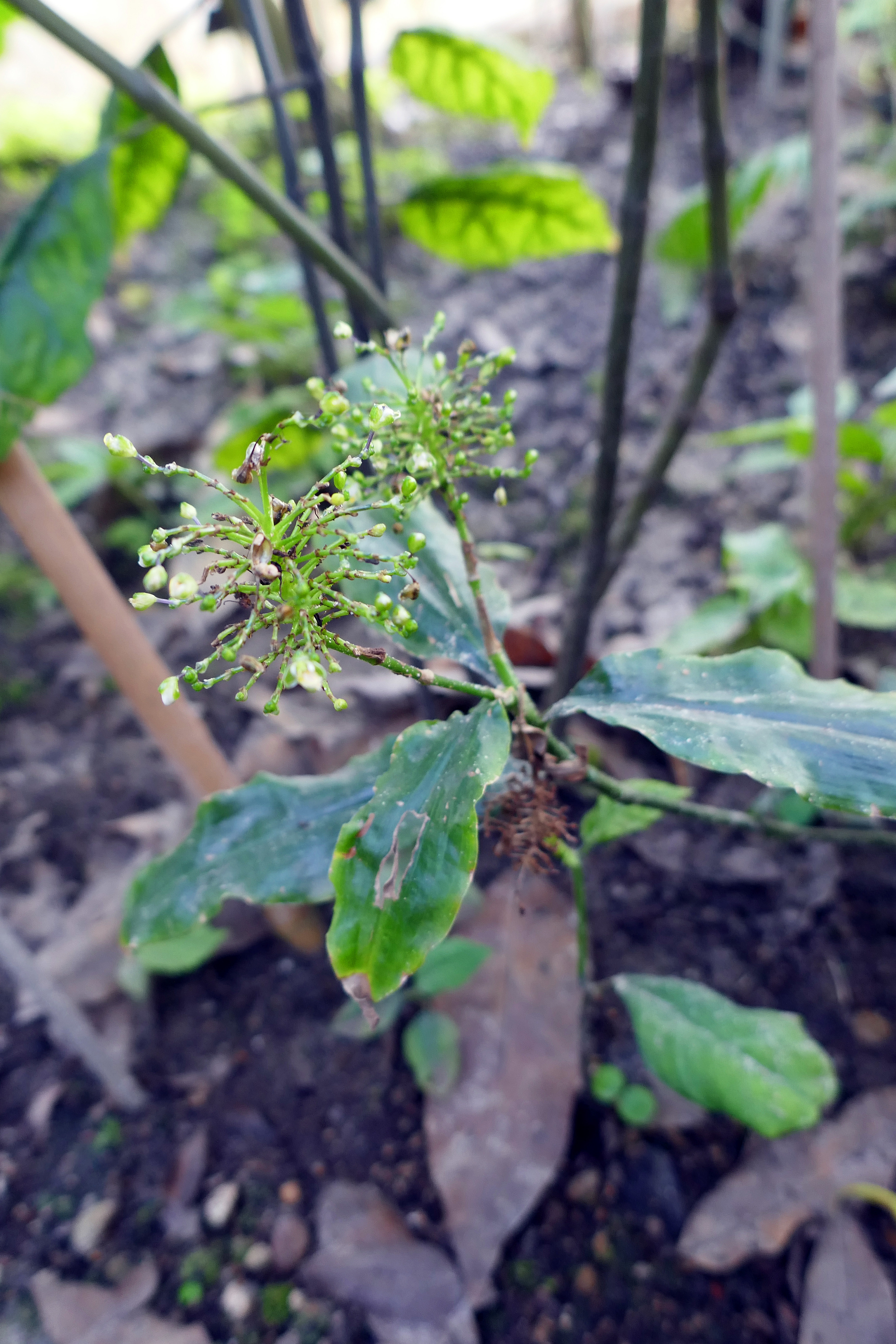 Aneilema beniniense Kunth Afrique tropicale. Jardin botanique Meise (Belgique)